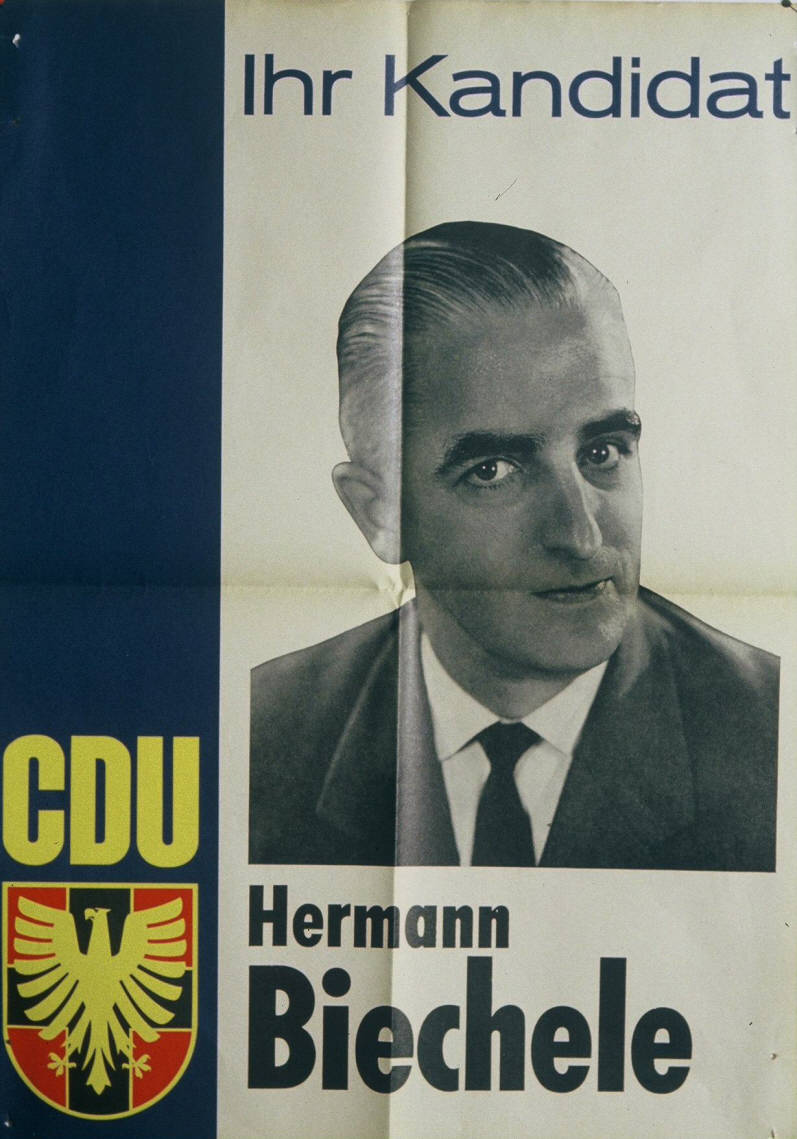 Ihr Kandidat Abbildung: Porträtfoto Plakatart: Kandidaten-/Personenplakat mit Porträt Auftraggeber: Verantw.: CDU-Bundesgeschäftsstelle Bonn Drucker_Druckart_Druckort: Repro-Druck, Schmiden bei Stuttgart Objekt-Signatur: 10-001: 1024 Bestand: Plakate zu Bundestagswahlen (10-001) GliederungBestand10-18: Plakate zu Bundestagswahlen (10-001) » Die 4. Bundestagswahl am 17. September 1961 » CDU » Mit Porträtfoto Lizenz: KAS/ACDP 10-001: 1024 CC-BY-SA 3.0 DE